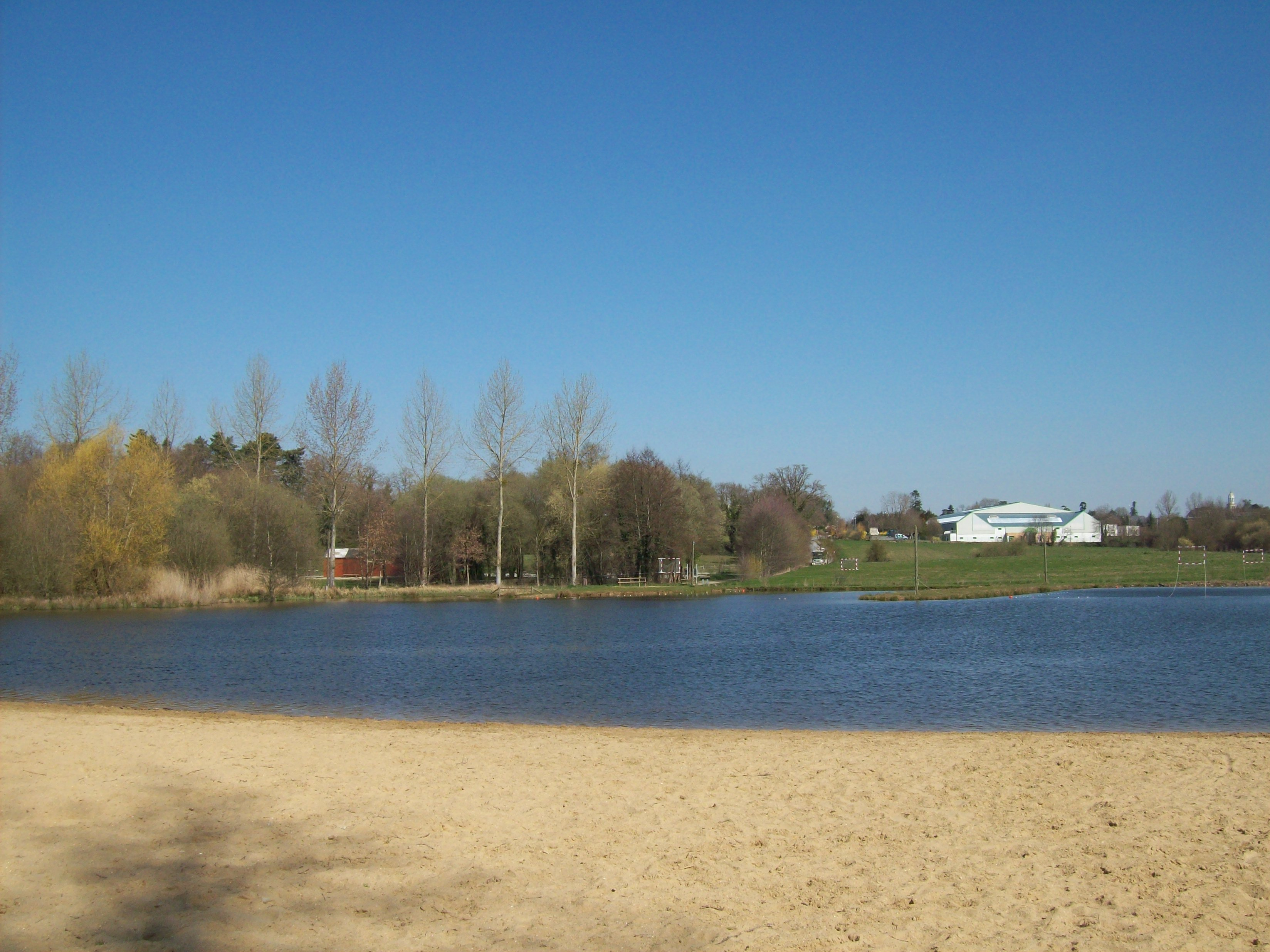 Plage de Vern-sur-Seiche, pavillon bleu.